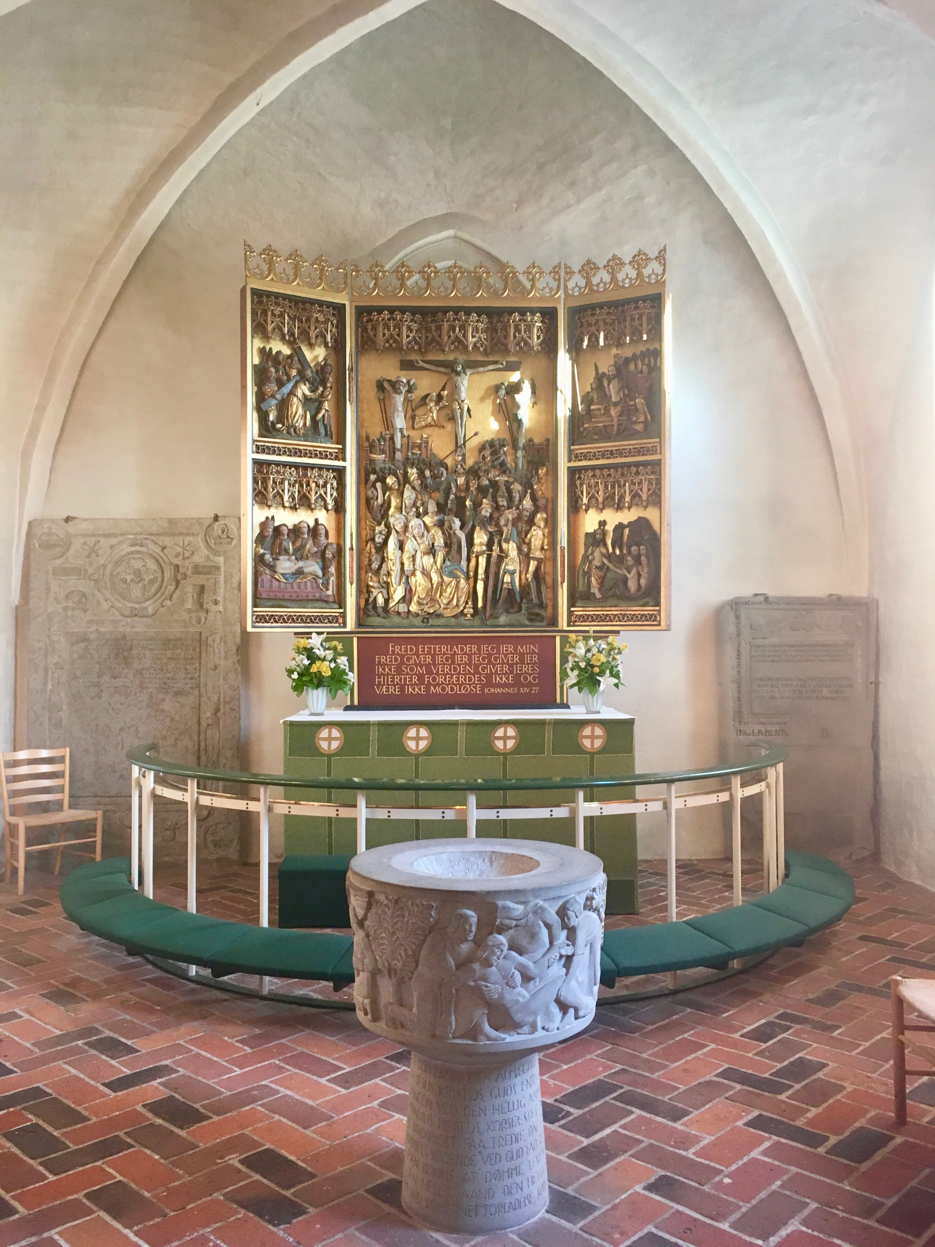 Kor, altertavle og døbefont i Birkerød Kirke